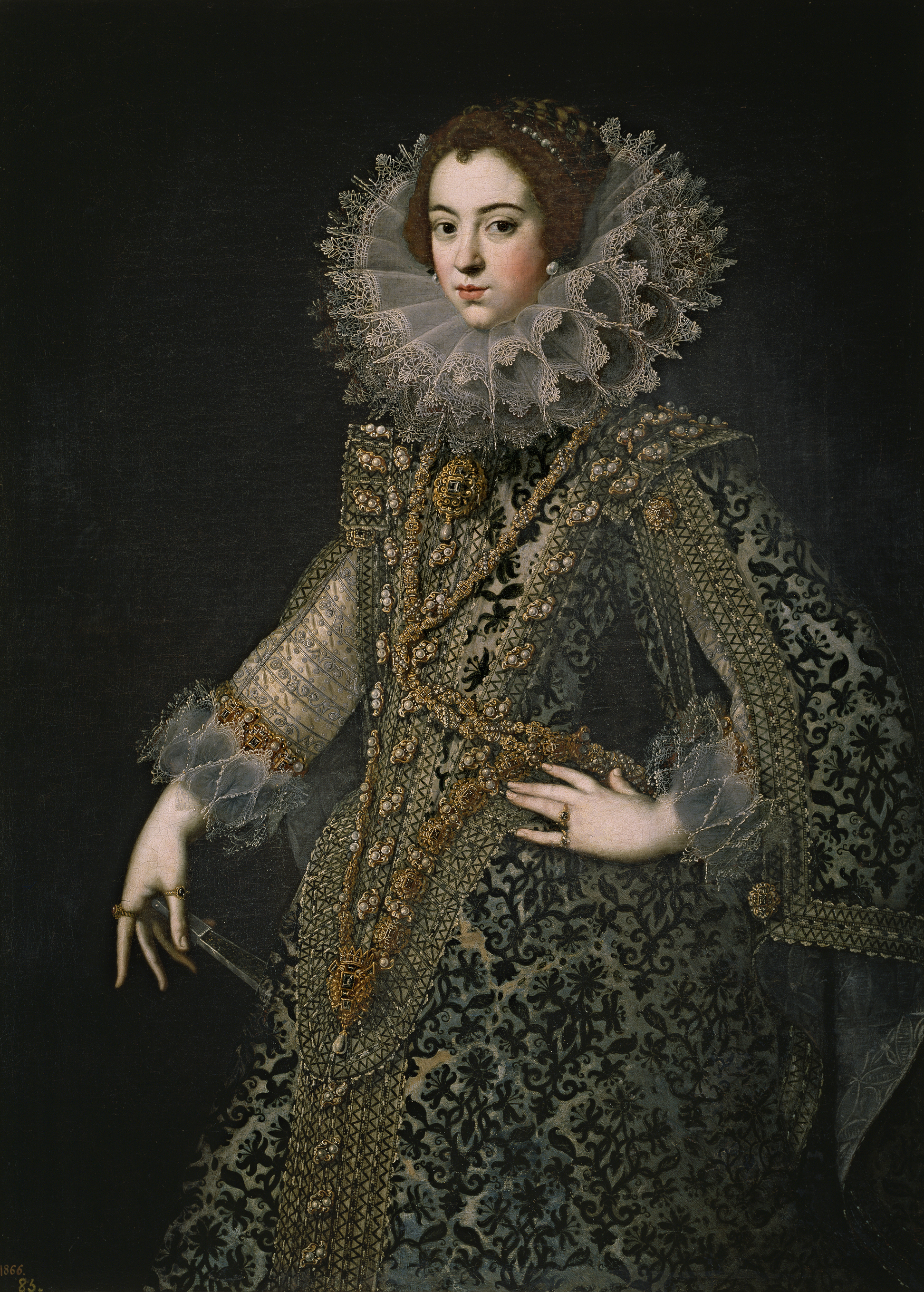 Retrato de la reina Isabel de Borbón (1602-1644), que fue hija del rey Enrique IV de Francia y la primera esposa del rey Felipe IV de España. El estilo de este pintor anónimo se relaciona con los retratistas de la segunda mitad del s. XVI e inicios del XVII: Antonio Moro, Sánchez Coello o Pantoja de la Cruz, caracterizado por la filigrana de los vestidos, la fuerte iluminación empleada y la atención al rostro y las manos. Su atribución resulta complicada, considerando Allende-Salazar que podría tratarse de un retrato ejecutado por Angelo Nardi, pintor italiano que llegó a España en 1607, trabajando hasta su fallecimiento en 1665. (Ficha en Artehistoria). En su Historia y guía de los museos de España, Juan Antonio Gaya Nuño lo describe como "retrato anónimo, excelente, acaso por Angelo Nardi, de la reina Isabel de Borbón, primera esposa de Felipe IV". En otra fuente (Arte y saber: la cultura en tiempos de Felipe III y Felipe IV : 15 abril-27 junio 1999) se indica: "retrato de Isabel de Borbón (de 1618 por Bartolomé González para la Sala de Retratos de El Pardo). Atribuido en el pasado a Pantoja de la Cruz y al italiano Angelo Nardi (1584-1666), quizá podría ser obra de Rodrigo de Villandrando, retratista muy desigual.